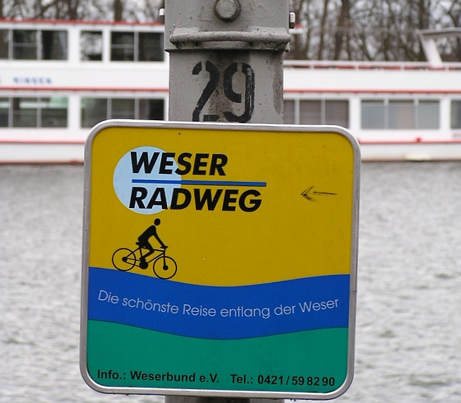 Schild am Weserradweg in Minden, Nordrhein-Westfalen.